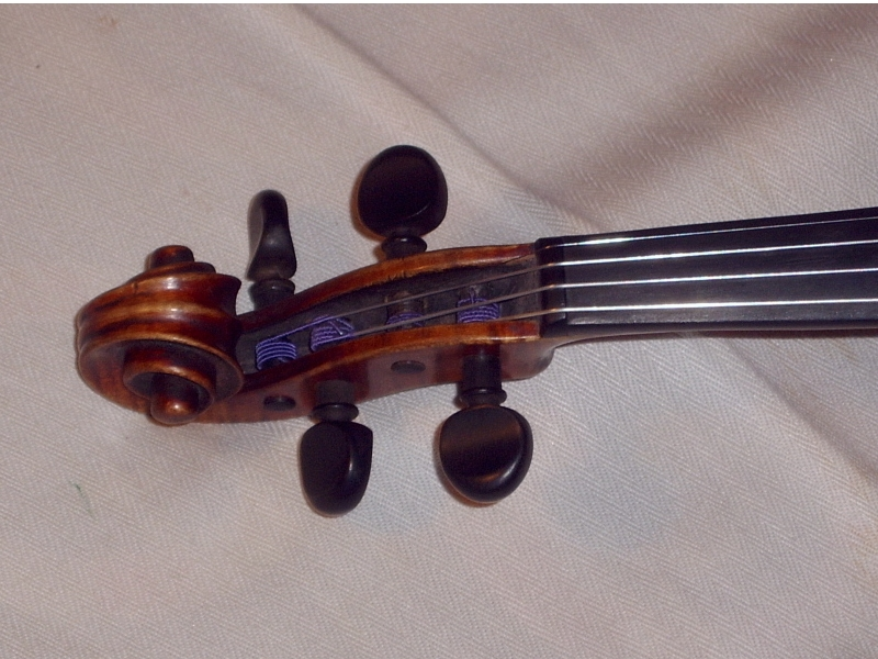 Ez a kép a hegedű csigáját, kulcstartóját, kulcsait és a fogólapot mutatja